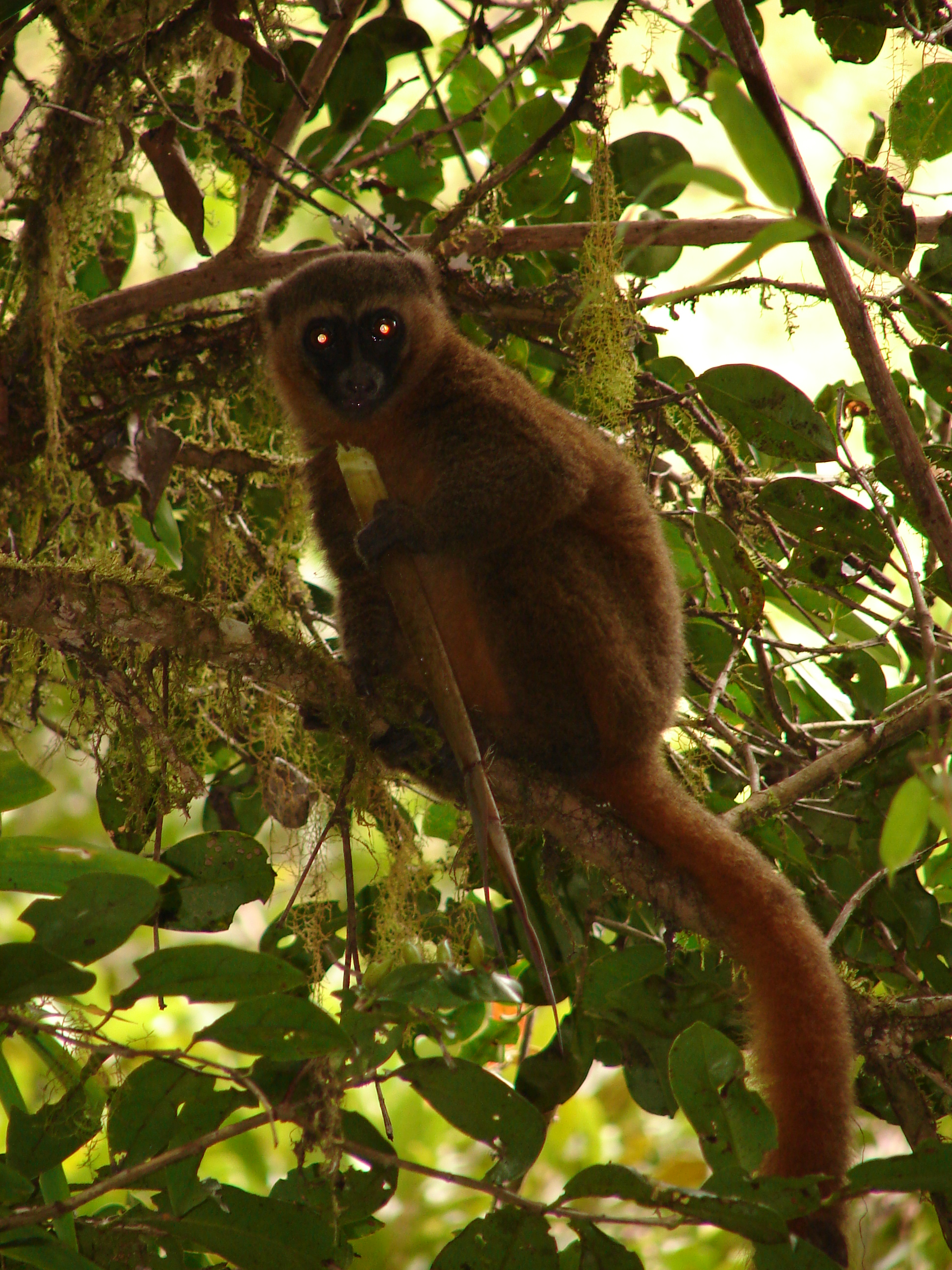 Hapalemur aureus Golden Bamboo Lemur, Ranomafana National Park